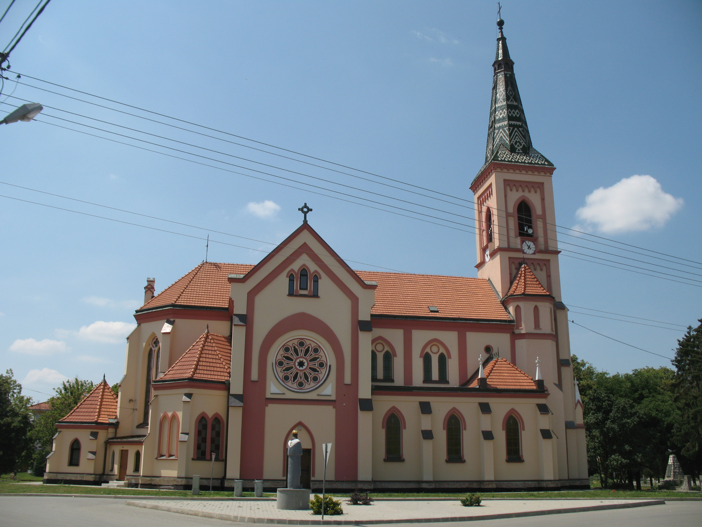 Nádszeg